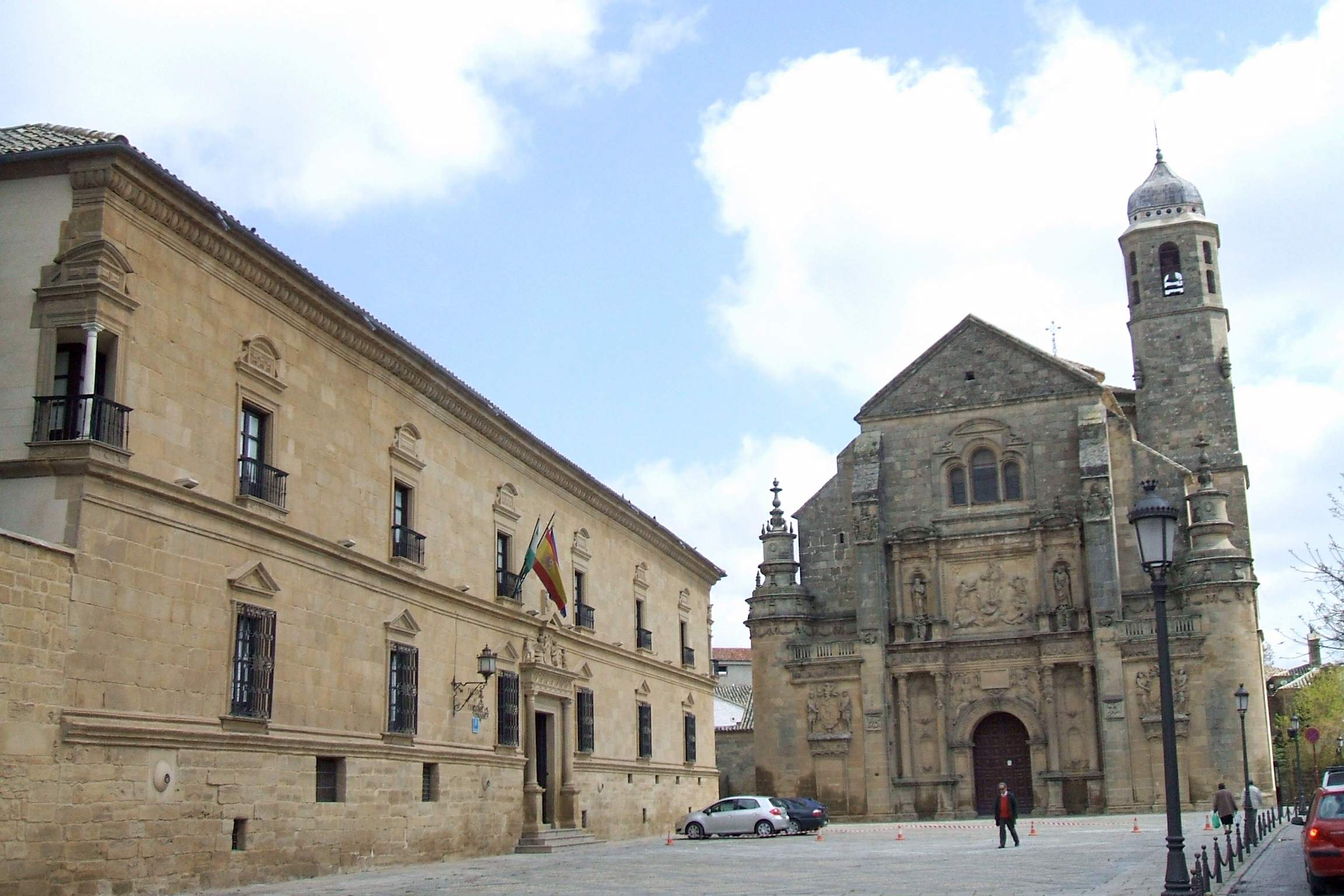 Úbeda - Capilla del Salvador y Palacio del Deán Ortega (Parador Nacional)